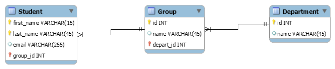 Логическая схема